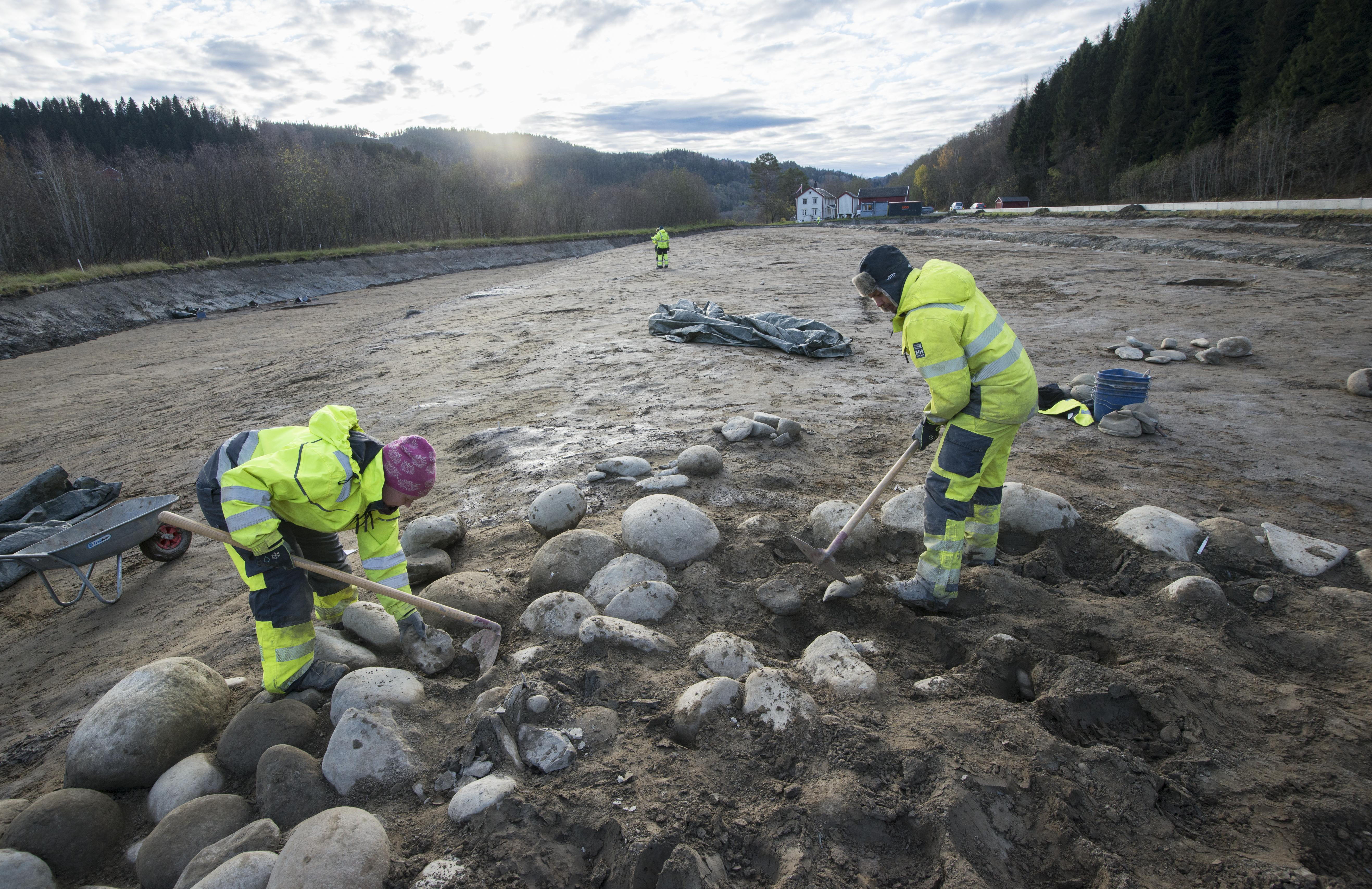 NTNU Vitenskapsmuseets utgravninger i forbindelse med Nye Veiers planlagte utbygging av Ny E6 mellom Melhus og Ulsberg. Foto: Åge Hojem / NTNU Vitenskapsmuseet